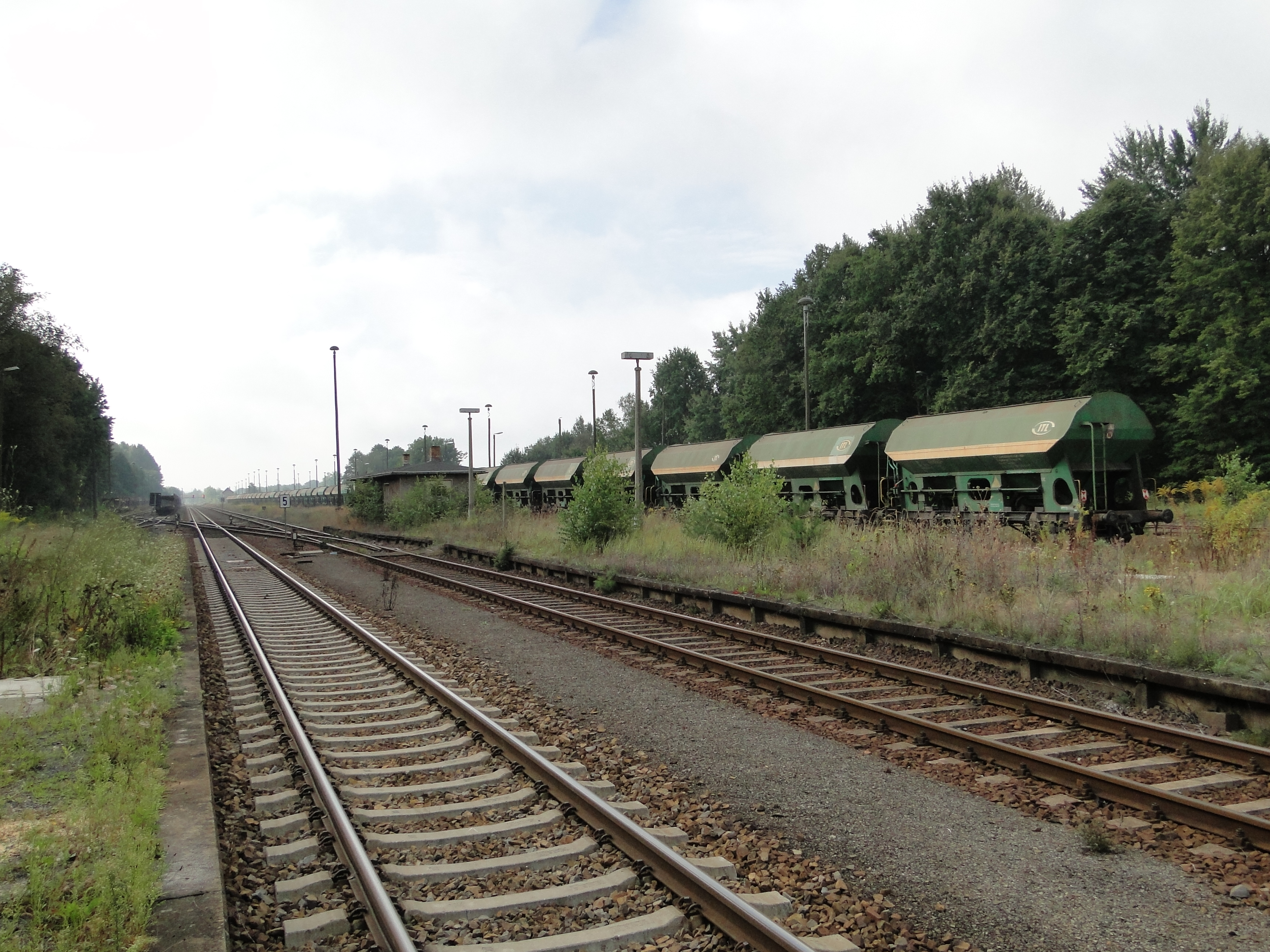 Bahnhof Straßgräbchen-Bernsdorf 2014